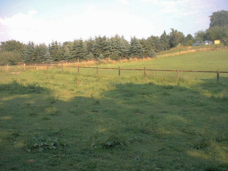 Weide und Wiese im Vergleich, Witten